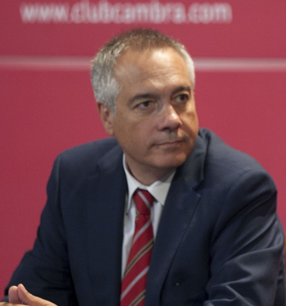 Dinar Cambra amb el primer secretari del PSC, Pere Navarro, 17 de setembre de 2012